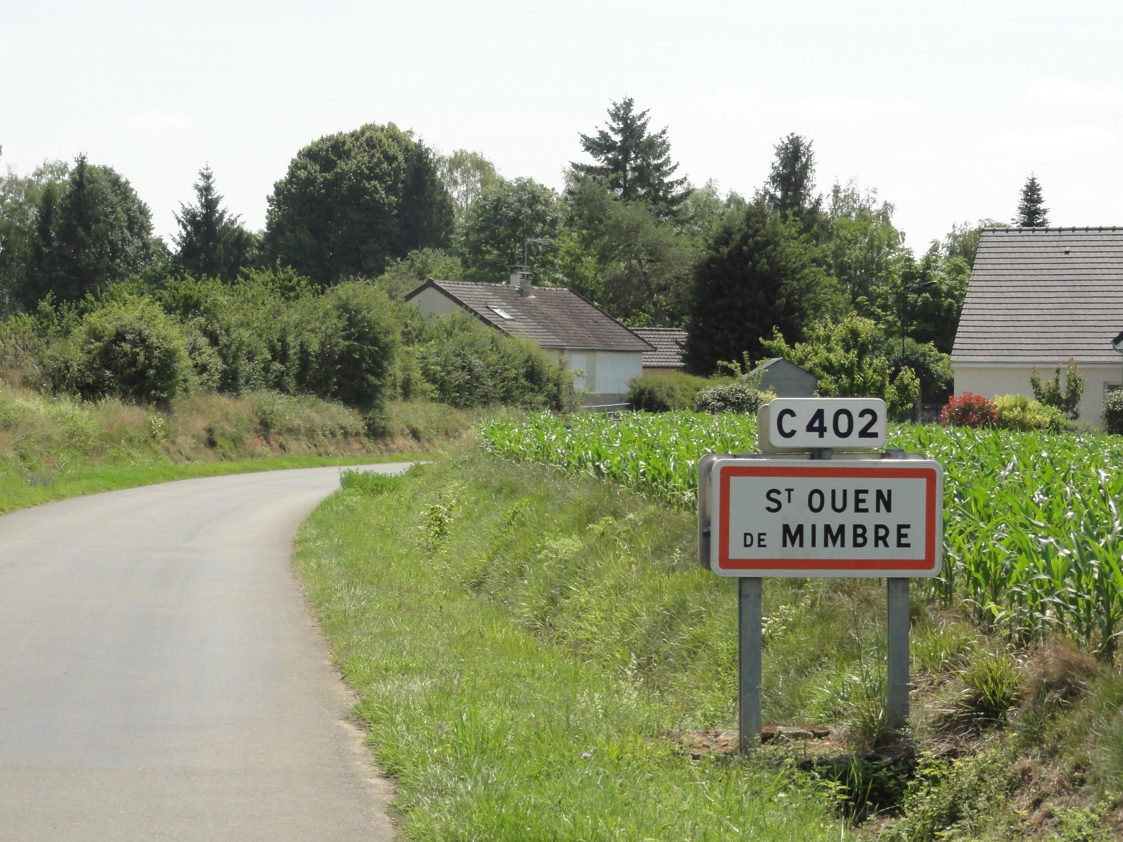 Saint-Ouen-de-Mimbré (Sarthe) entrée